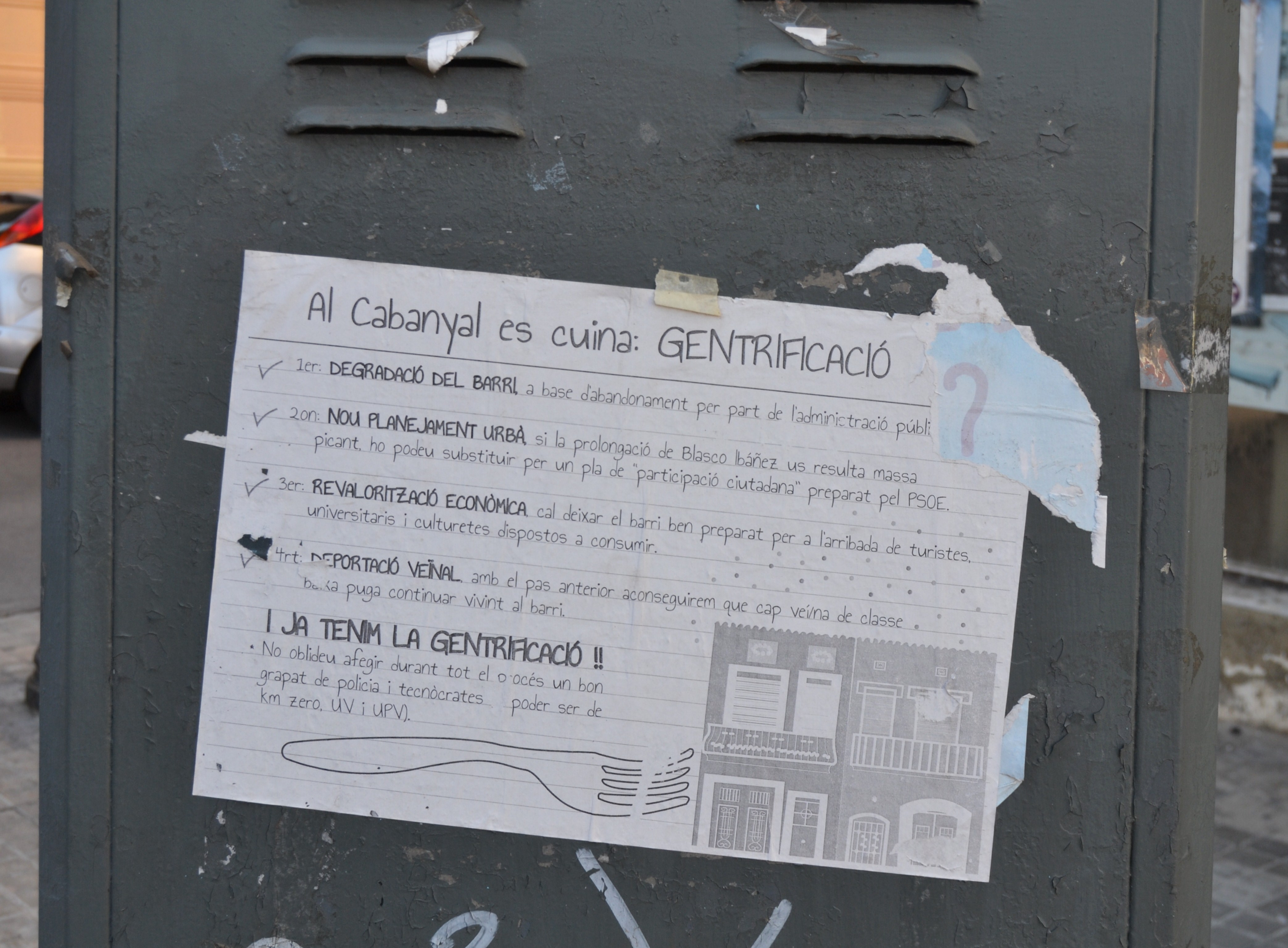 Al Cabanyal es cuina gentrificació.